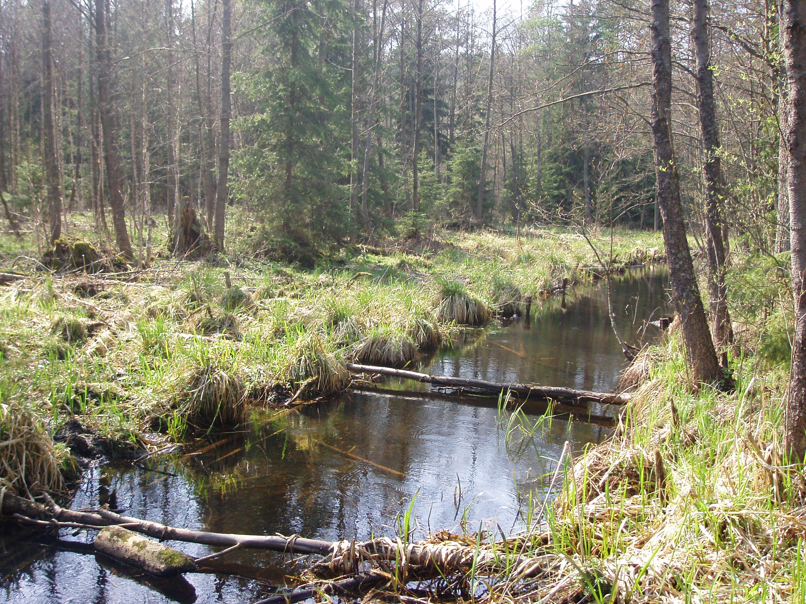 Strumień sródleśny w lesie k. Łasu